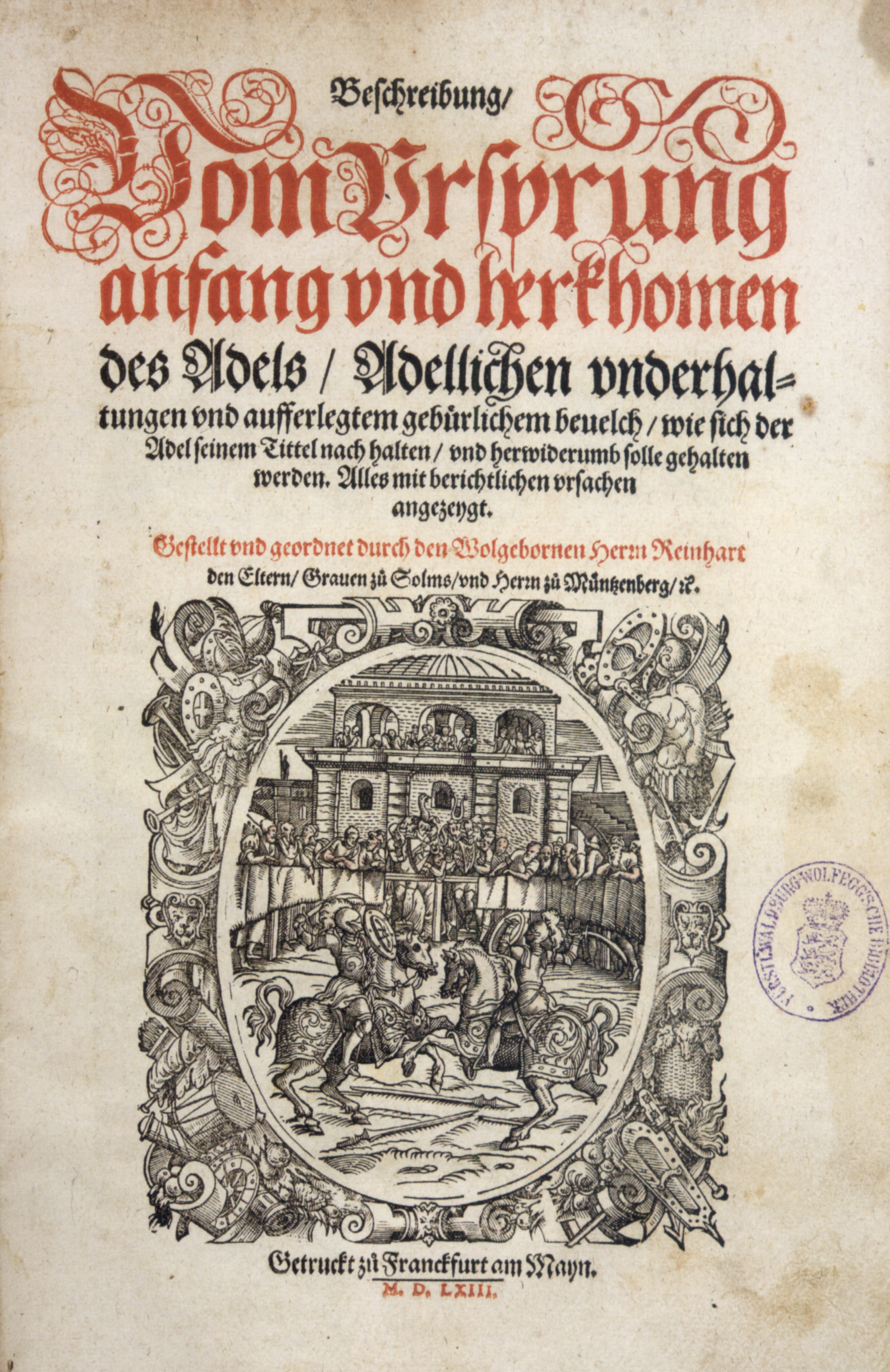 Reinhard zu Solms: Beschreibung Vom Ursprung anfang vns herkohomen des Adels / Adellichen vnderhaltungen vnd aufferlegtem gebürlichem beuelch ... EA 1553, hier Titel der Ausgabe Frankfurt 1563; Exemplar der Fürstlichen Kunstsammlungen Waldburg-Wolfegg